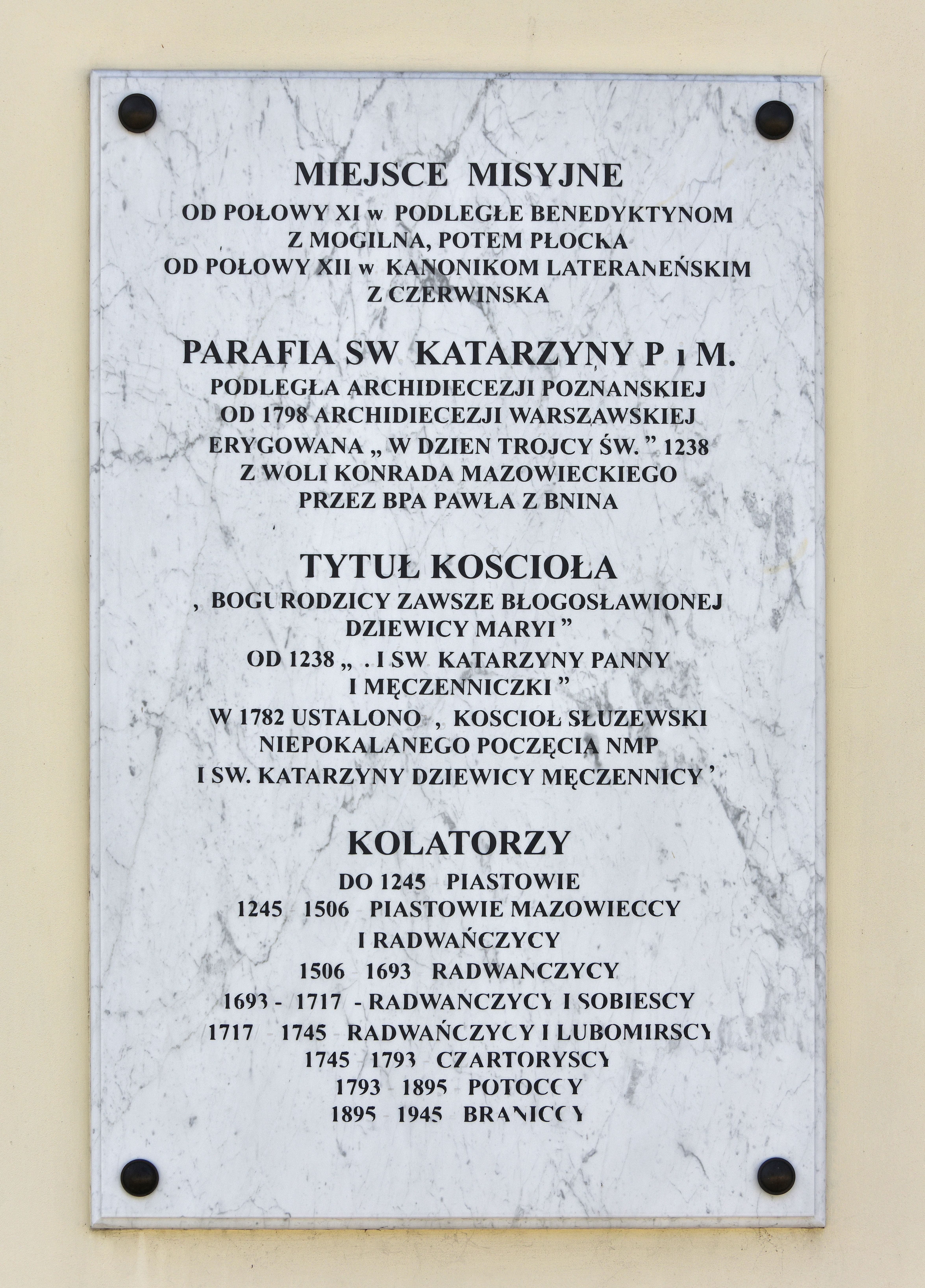 Tablica informacyjna na kościele św. Katarzyny w Warszawie